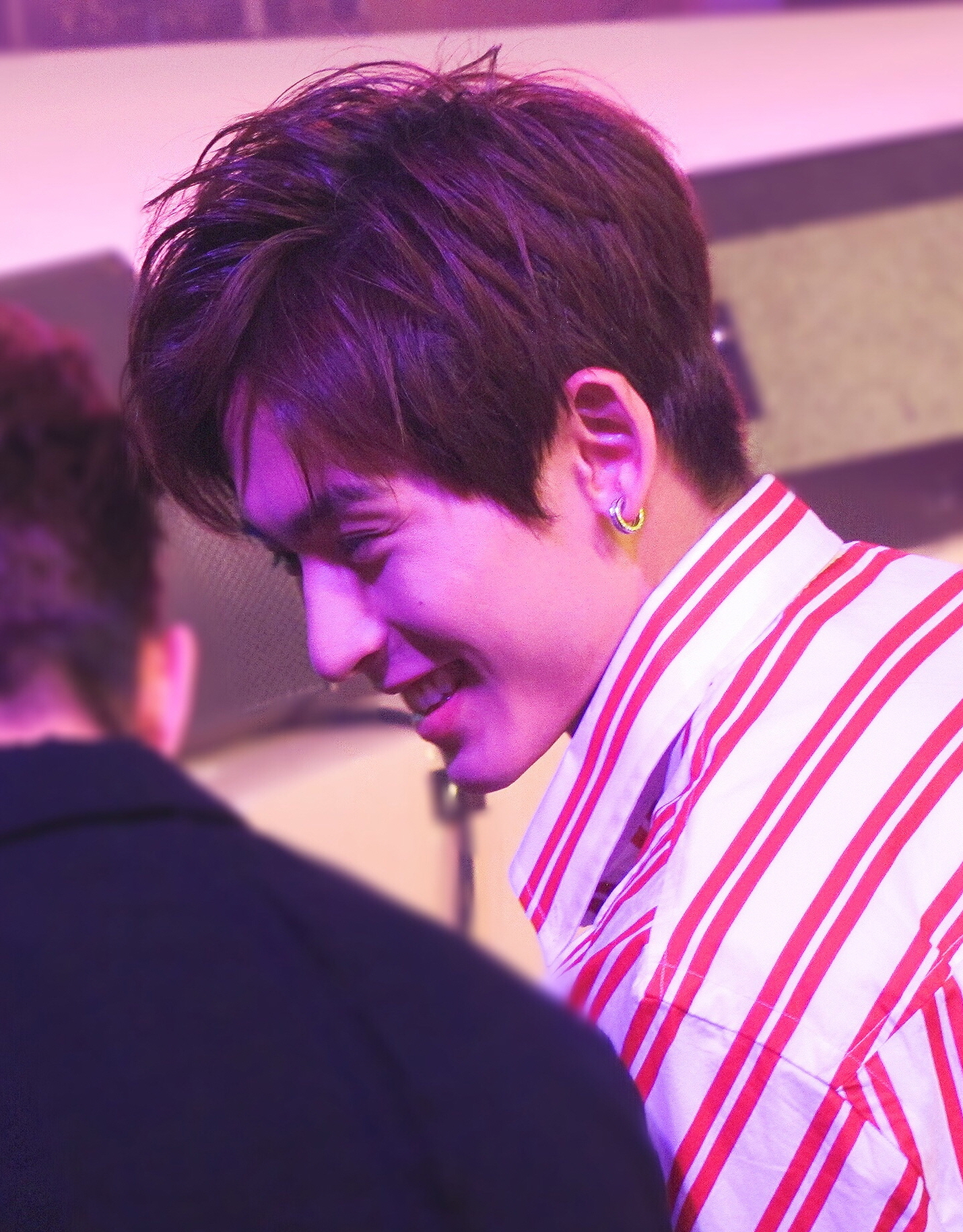 中文（中国大陆）: 张哲瀚 (2017)